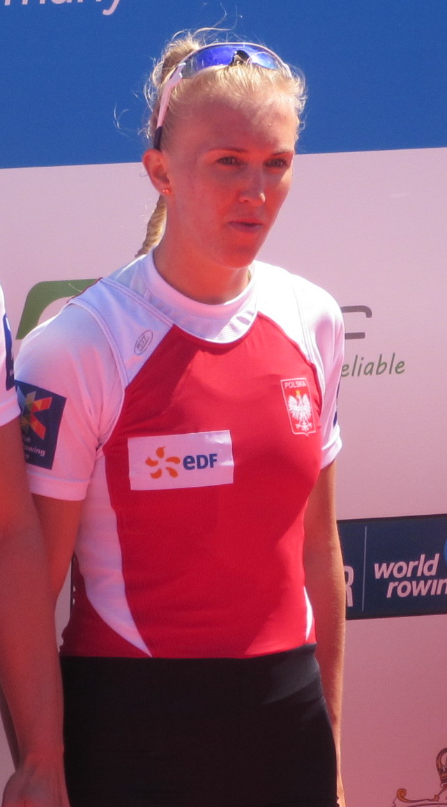 Monika Ciaciuch, Maria Springwald, Joanna Leszczyńska, Agnieszka Kobus, Ruder-EM 2016